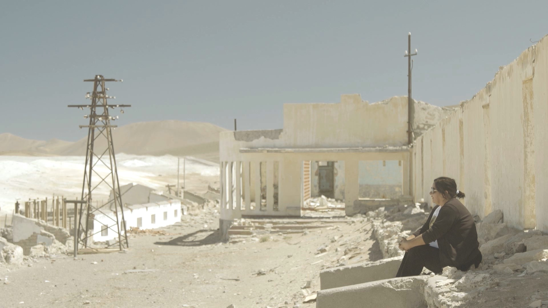 Nora Gallegos entrevistada por Tino Pereira en su pueblo natal